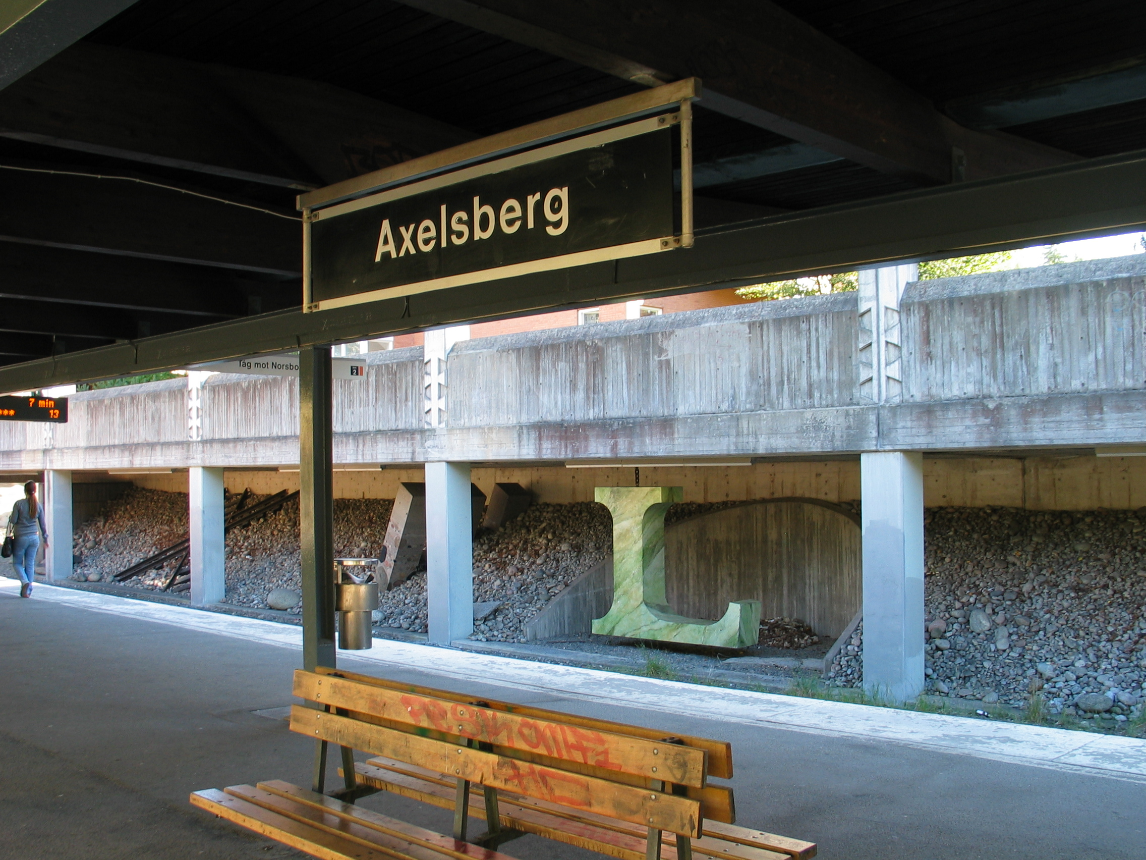 Axelsberg, a metro station in Stockholm, Sweden.